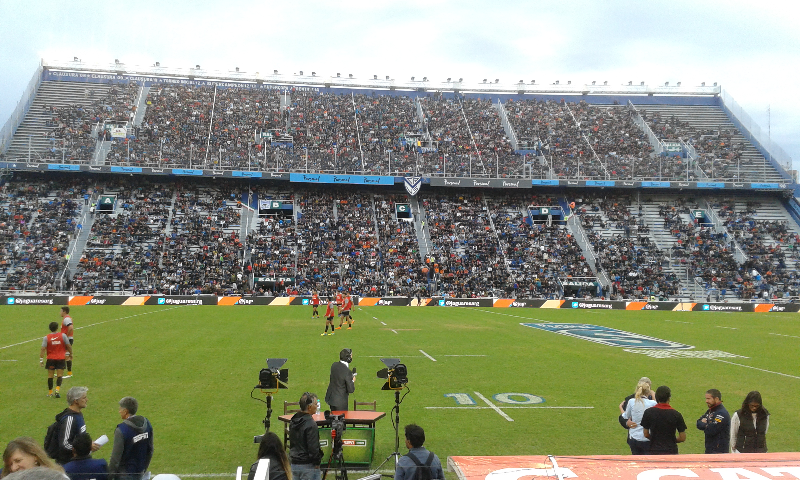 Foto 05 - Juego Jaguares vs. Chiefs